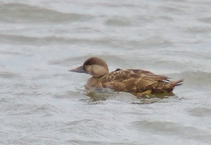 Scientific name: Melanitta nigra (female)